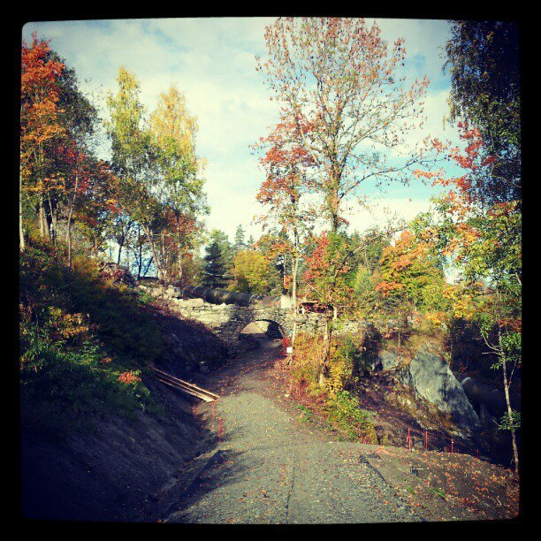 Kulturstien Haugfossen rundt